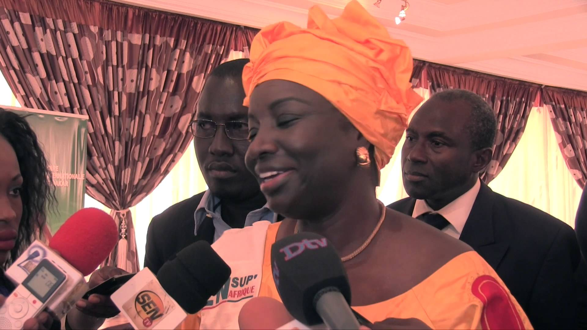 Interview de Aminata Touré